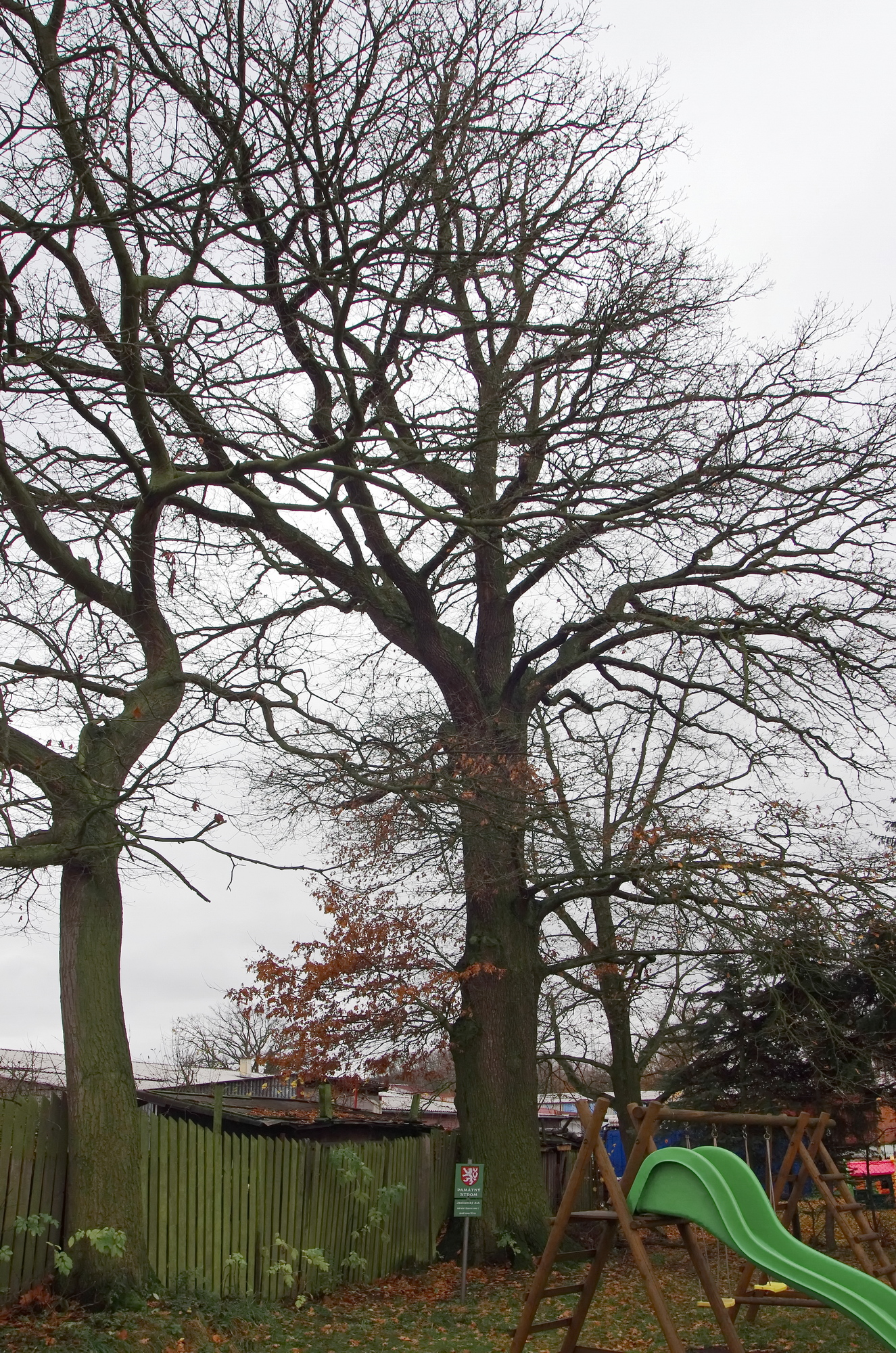 památný strom - Jenišovský dub - Jenišov, okres Karlovy Vary